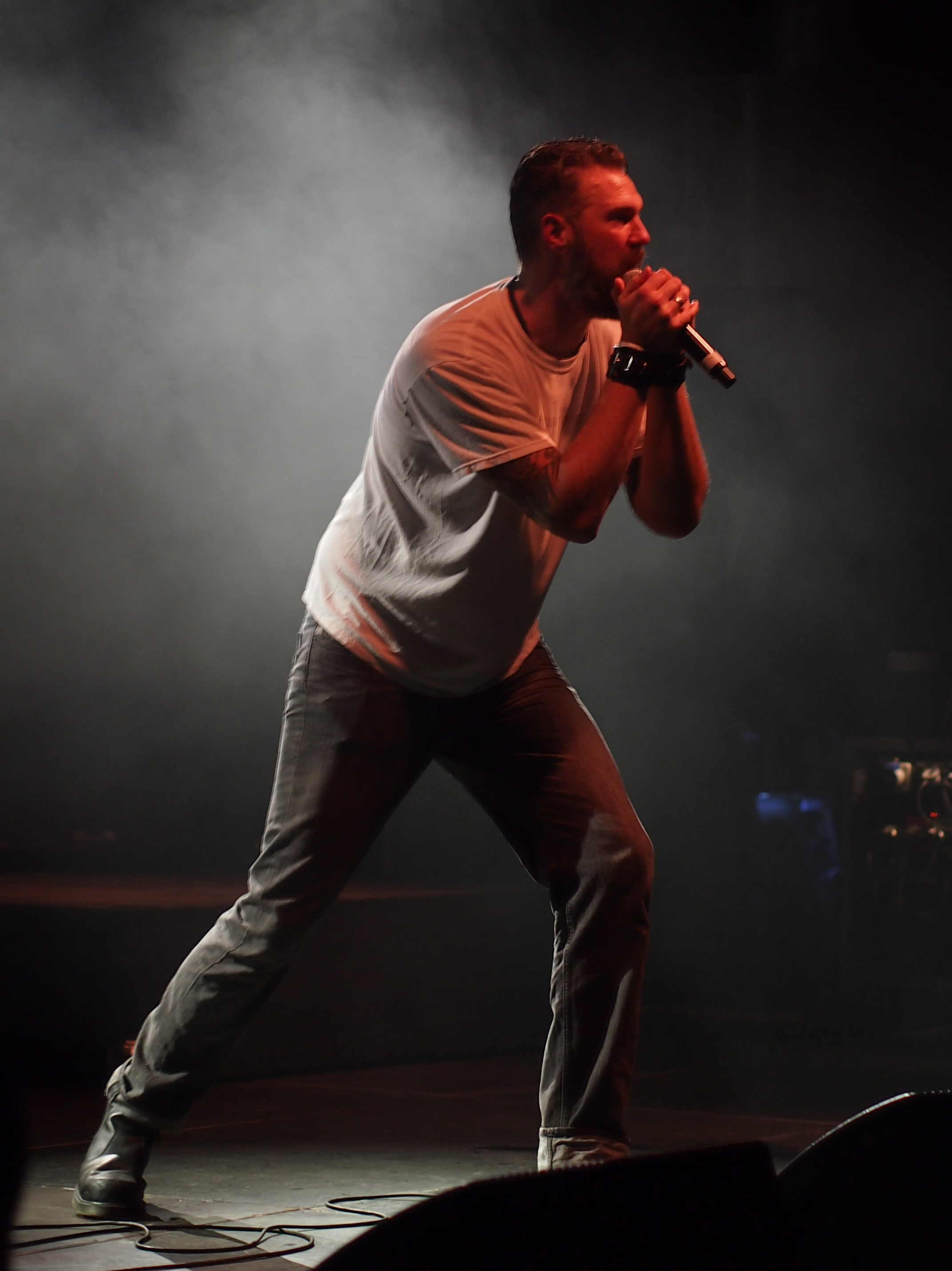 Pouppée Fabrikk auf dem E-Tropolis-Festival 2014 Festivalsommer This photo was created with the support of donations to Wikimedia Deutschland in the context of the CPB project "Festival Summer". This file is made available under the Creative Commons CC0 1.0 Universal Public Domain Dedication. The person who associated a work with this deed has dedicated the work to the public domain by waiving all of their rights to the work worldwide under copyright law, including all related and neighboring rights, to the extent allowed by law. You can copy, modify, distribute and perform the work, even for commercial purposes, all without asking permission. Thomas Springer Personality rights warningAlthough this work is freely licensed or in the public domain, the person(s) shown may have rights that legally restrict certain re-uses unless those depicted consent to such uses. In these cases, a model release or other evidence of consent could protect you from infringement claims.